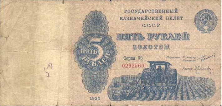 5 рублей СССР. Аверс